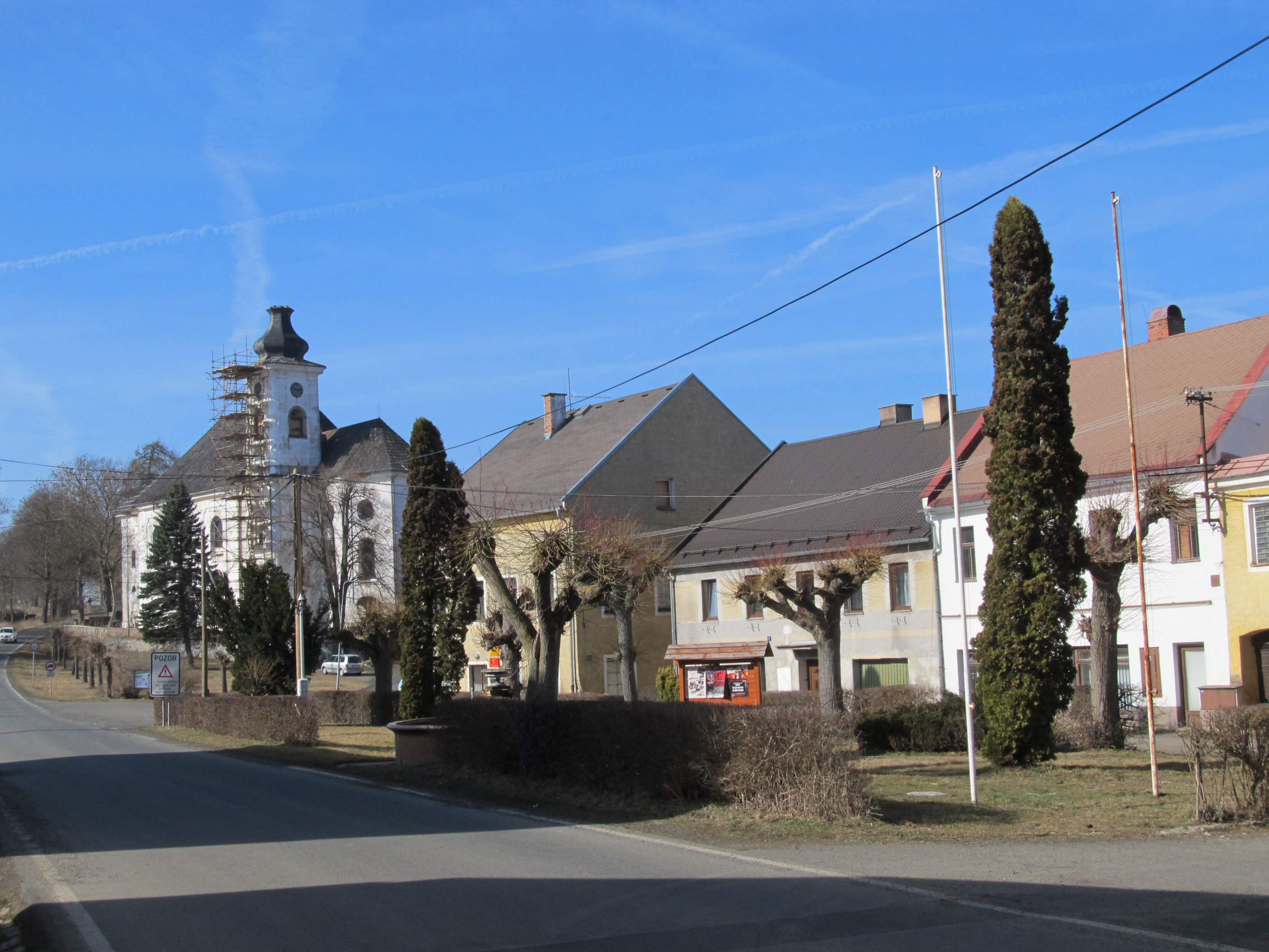 Mnichov - náměstí